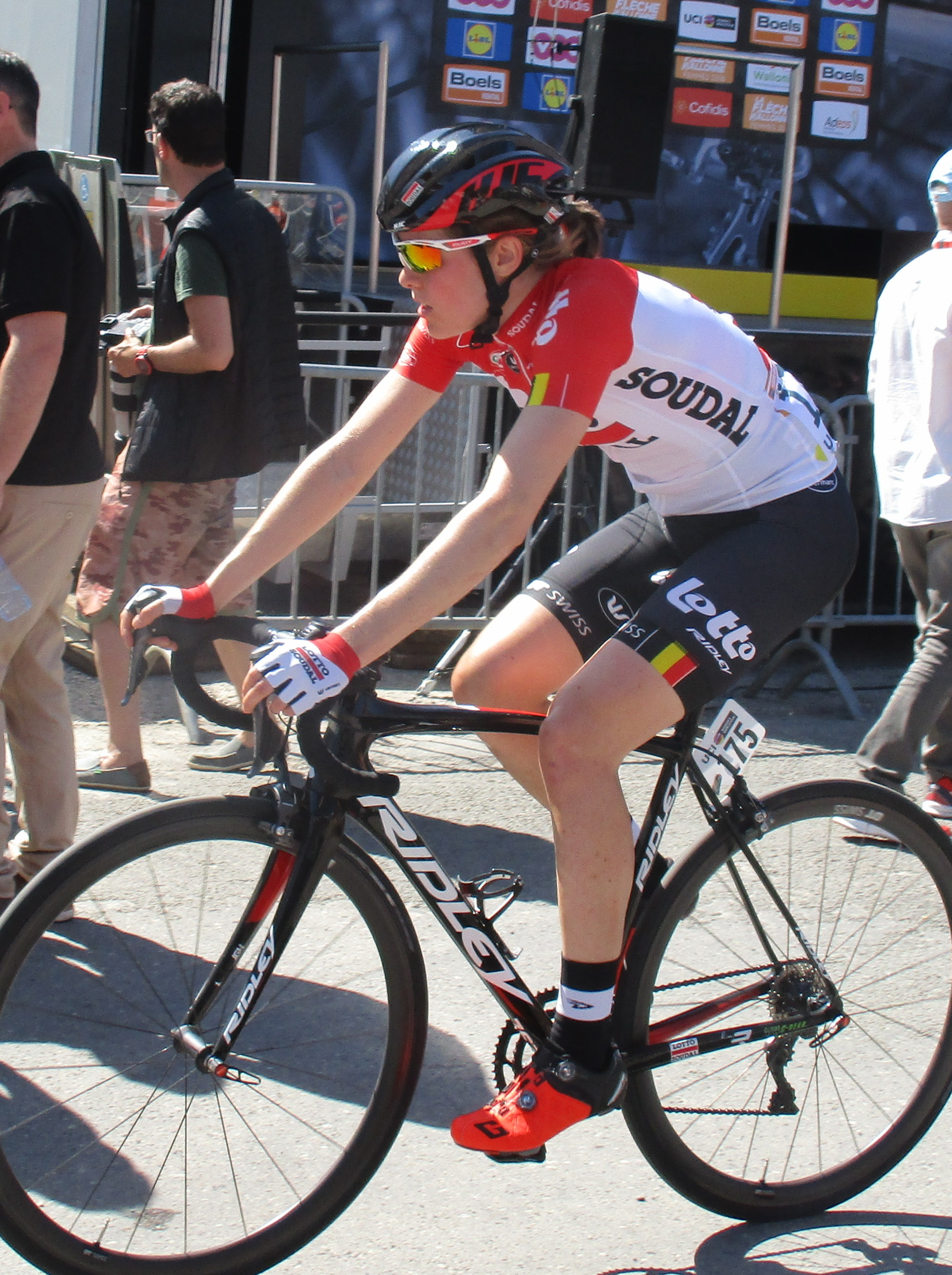 Finish van de Waalse Pijl 2018 op de Mur van Huy.